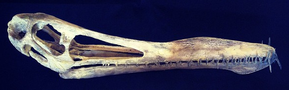 Anhanguera piscator @ Dinoexpo 2013